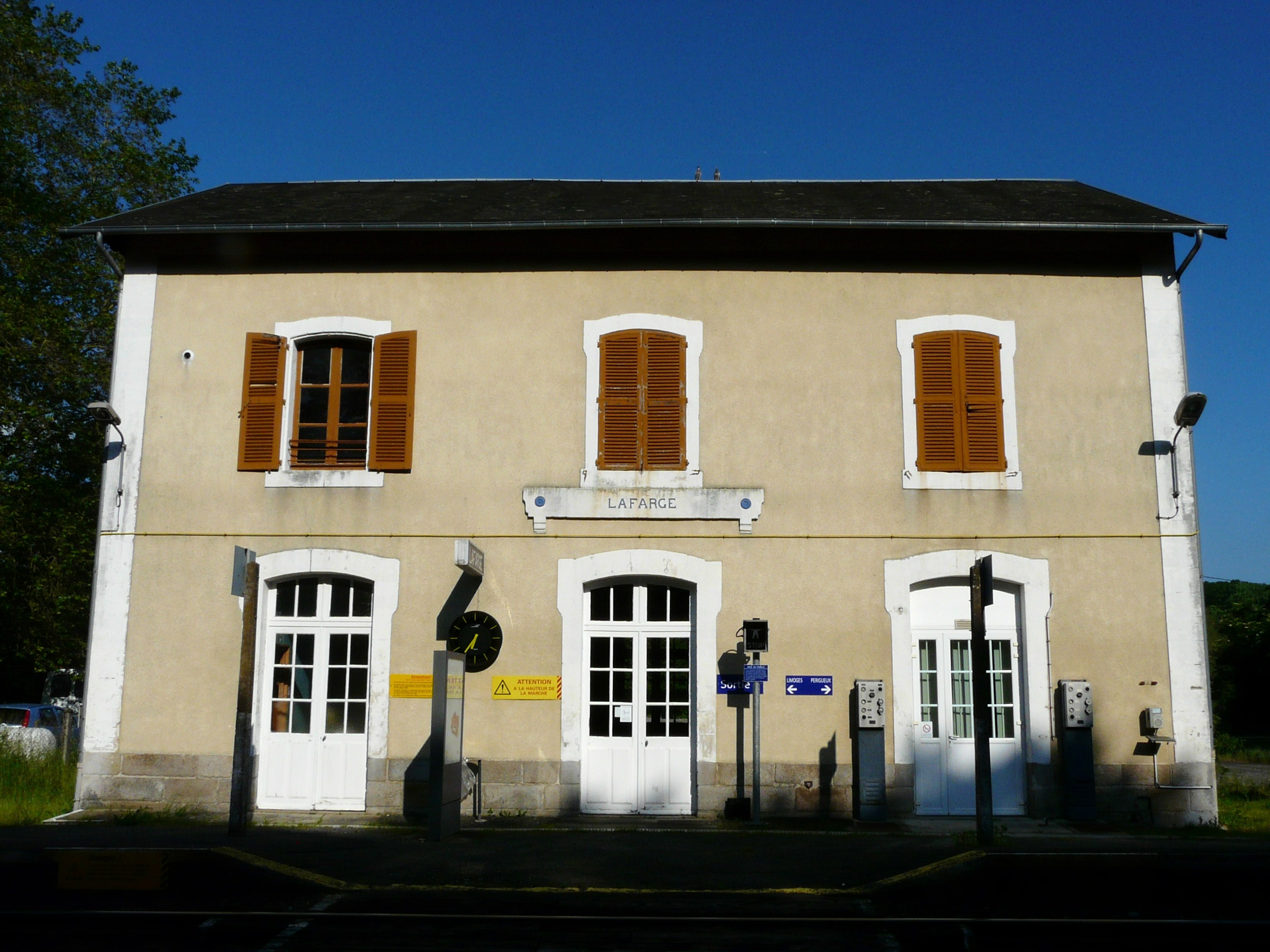 Le bâtiment voyageurs de la gare de Lafarge, Saint-Hilaire-les-Places, Haute-Vienne, France.